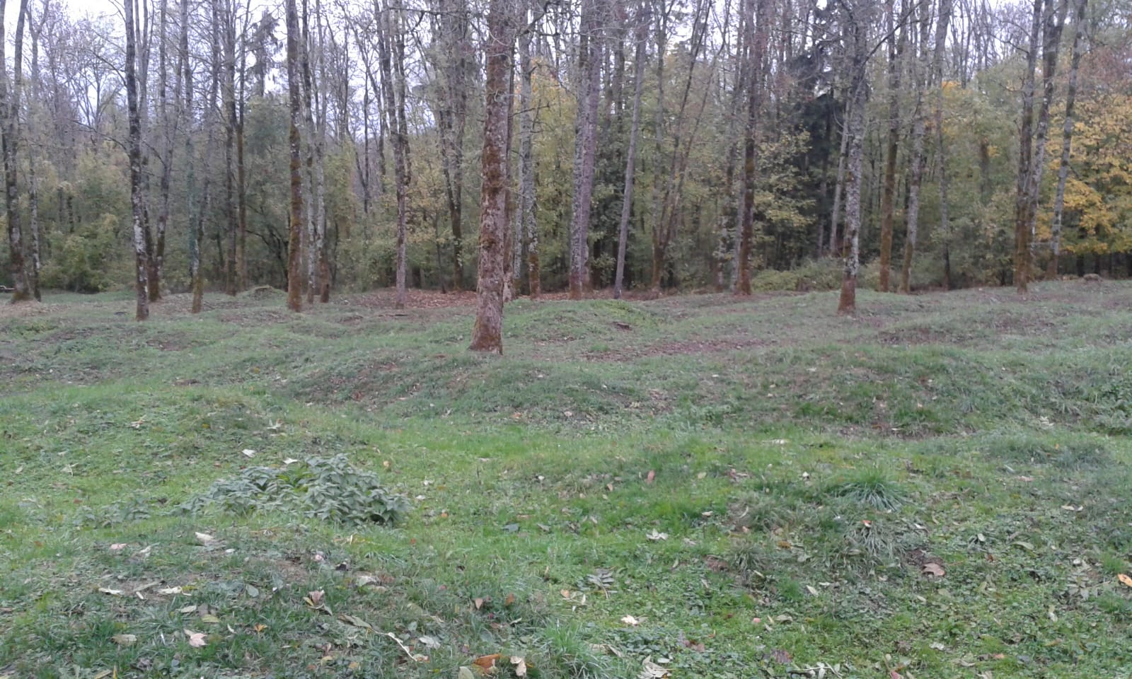 Douaumont